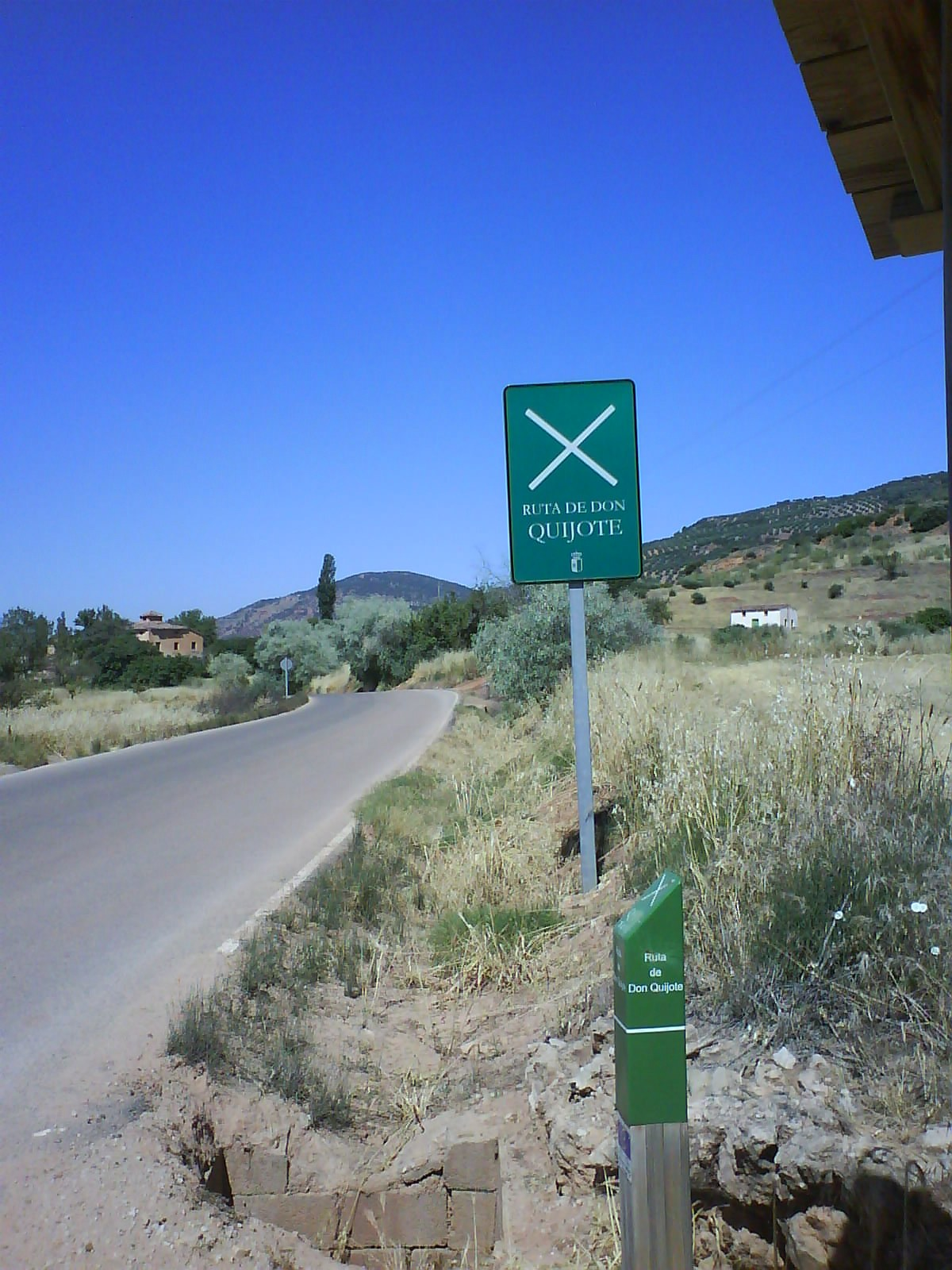 Hitos de la ruta de Don Quijote cerca de la localidad de Bienservida (Albacete), fomentada por la Junta de Comunidades de Castilla-La Mancha.